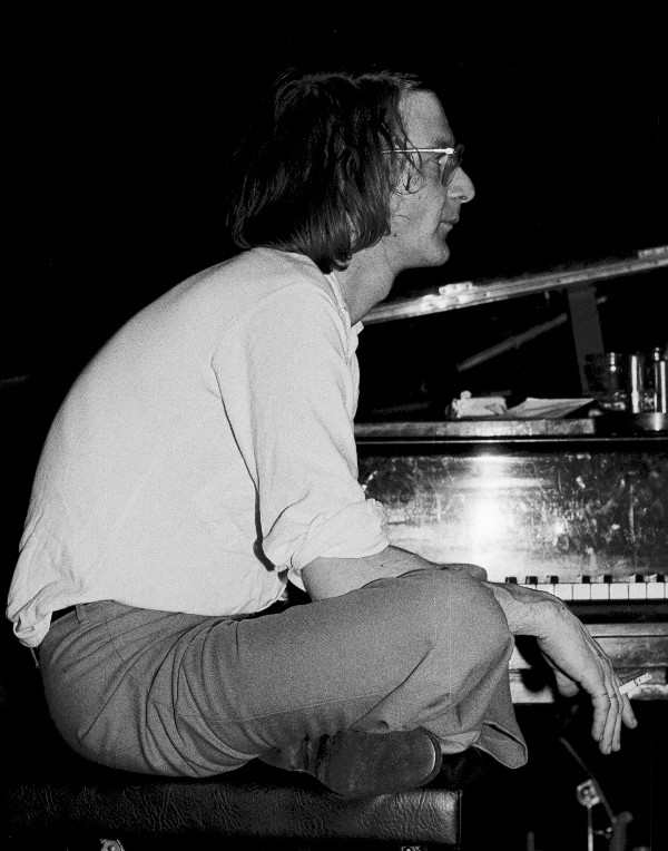 Leo Cuypers tijdens een "Klap op de Vuurpijl" concert, 1978.